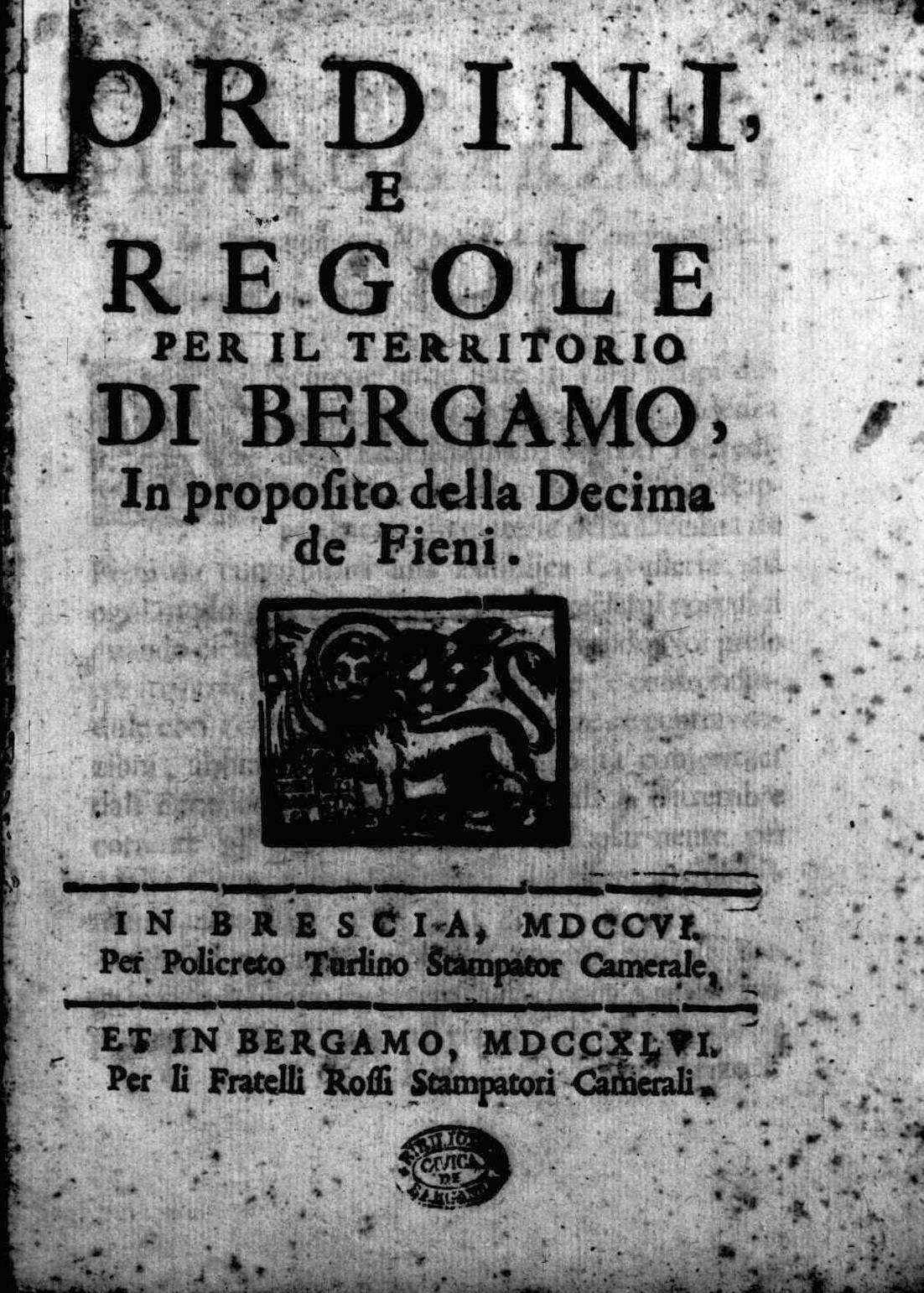 Frontespizio